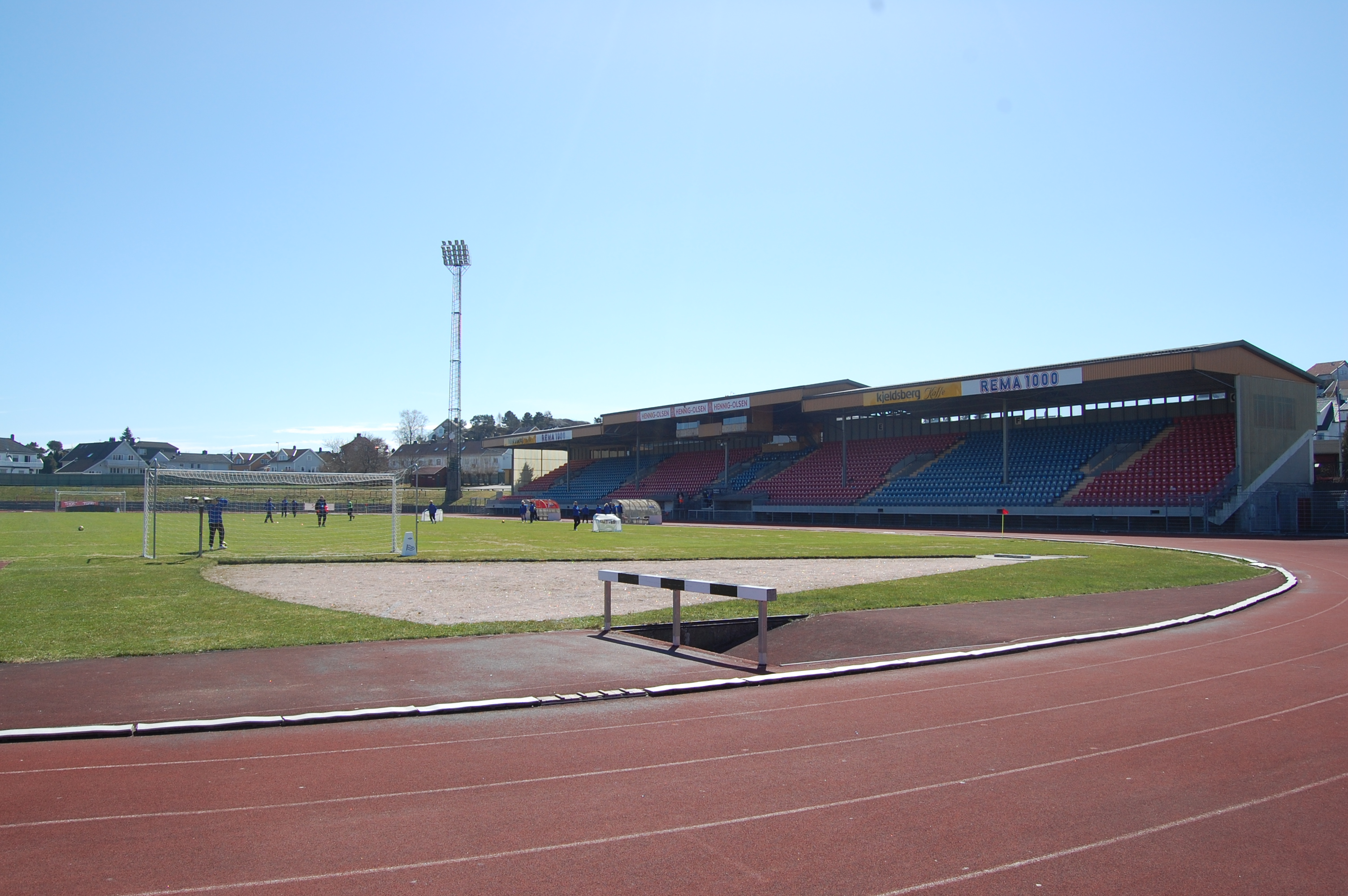 Norsk (bokmål): Kristiansand stadion på Lund, Kristiansand